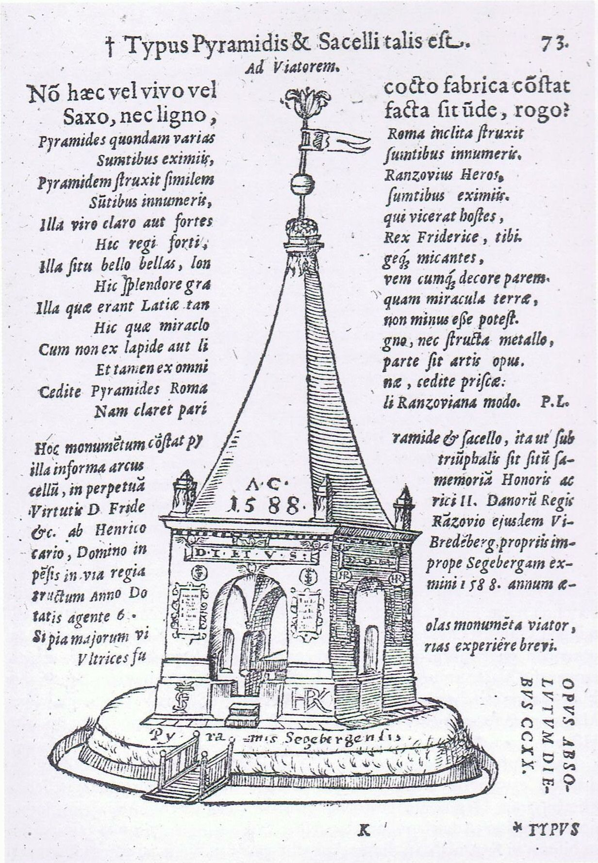 Die Segeberger Pyramide (errichtet unter Heinrich Rantzau) in den Commentarii rerum memorabilium in Europa gestarum, Darstellung (1593) von Peter Lindenberg